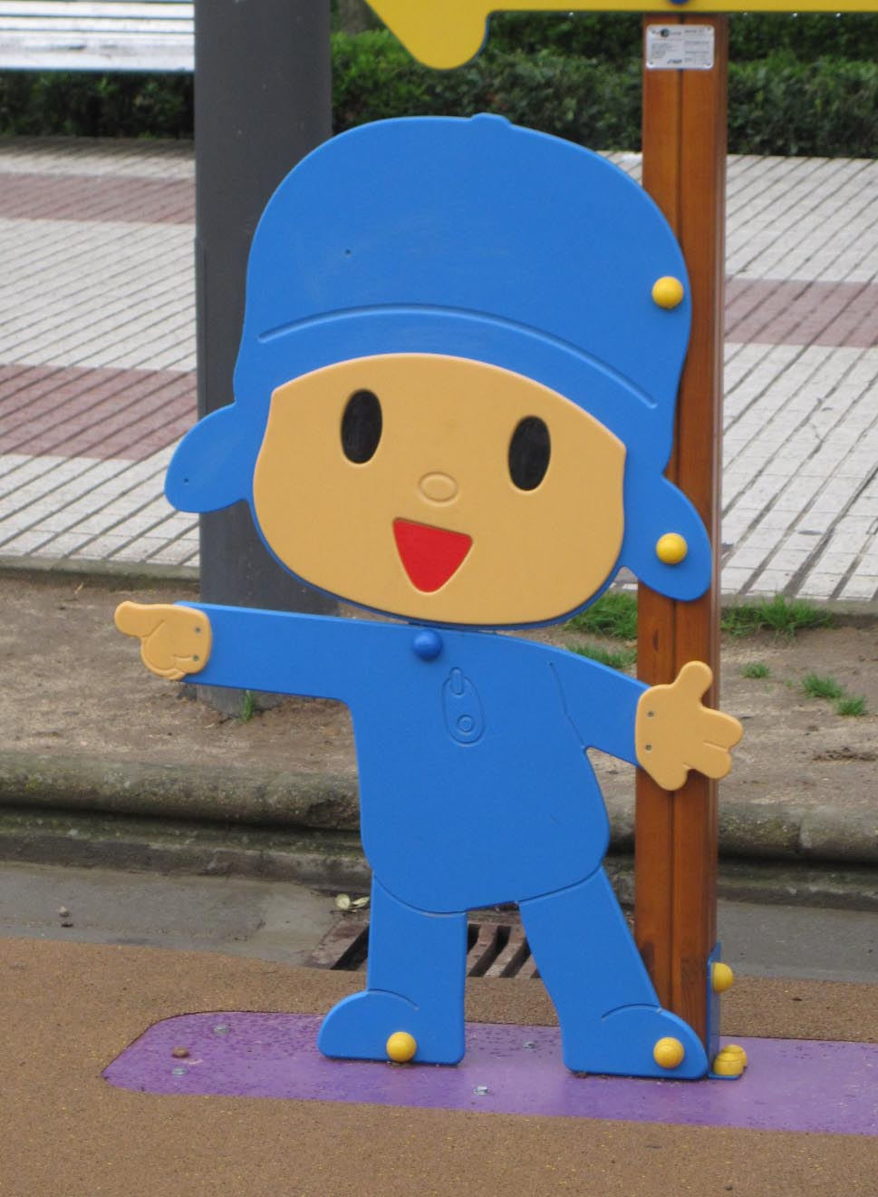 Imagen de Pocoyo en un parque de León (España).